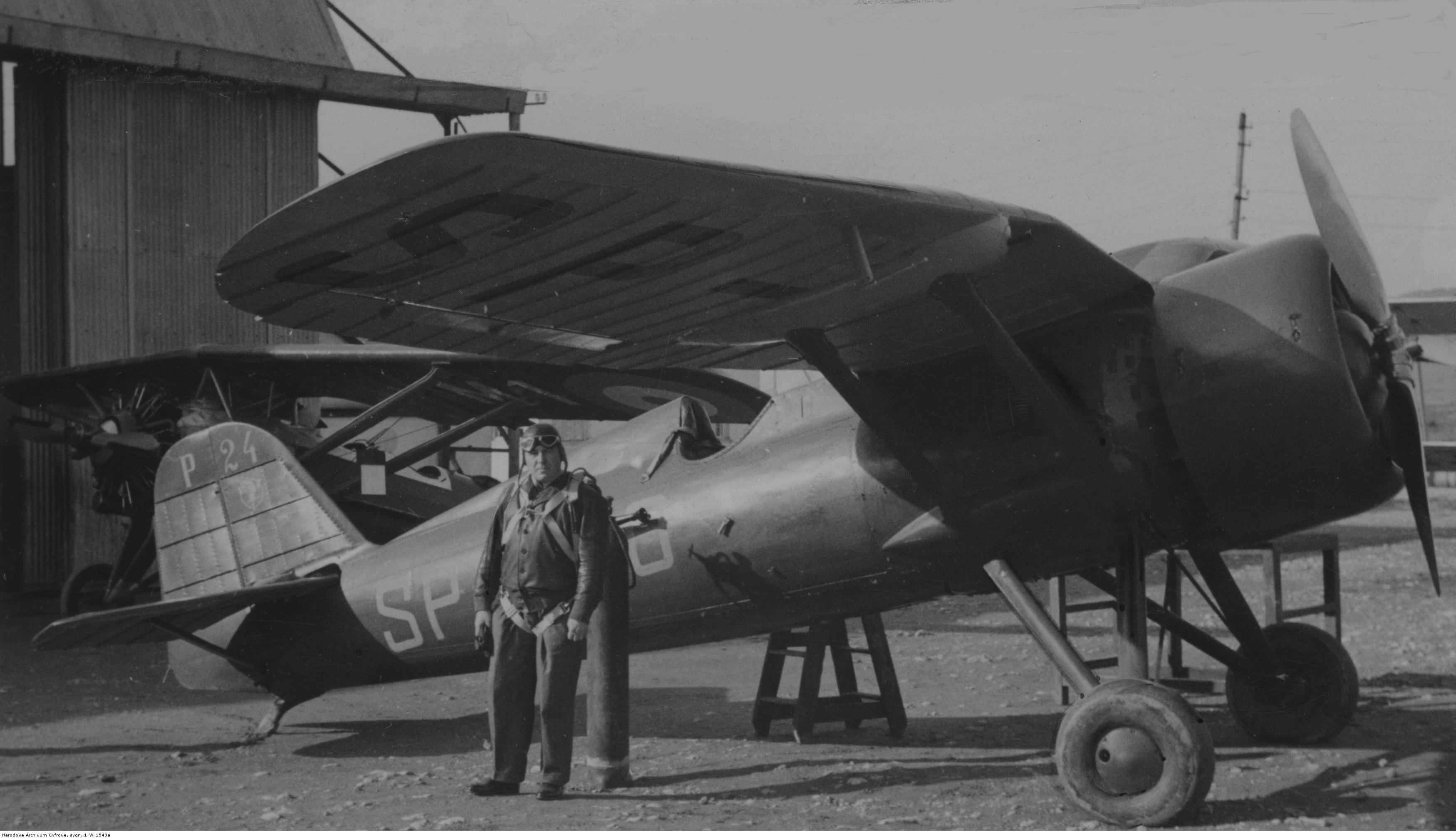 Samolot PZL P.24 na lotnisku w Atenach. Koncern Ilustrowany Kurier Codzienny - Archiwum Ilustracji. Sygnatura: 1-W-1549a